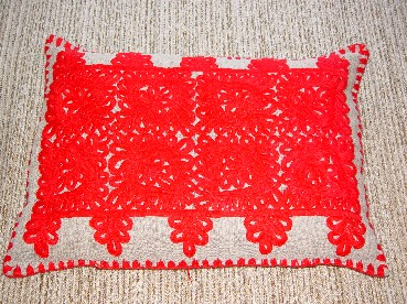 Hímzett piros párna (írott piros hímzés)